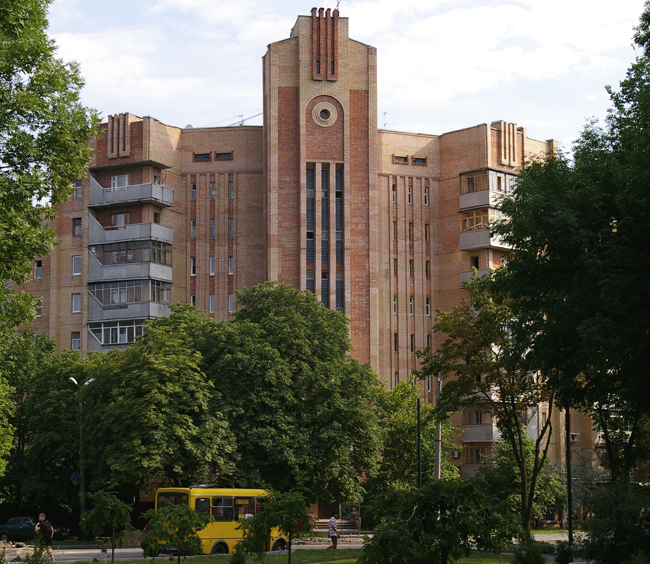 Харьков